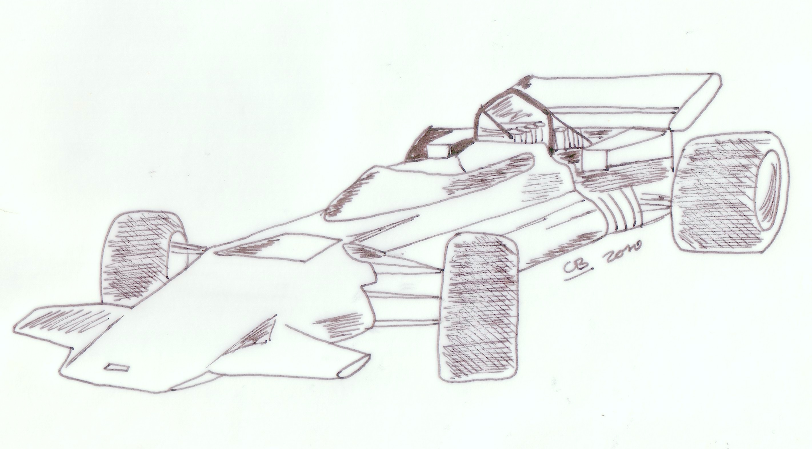 the Connew PC1 (Formula one 1972)